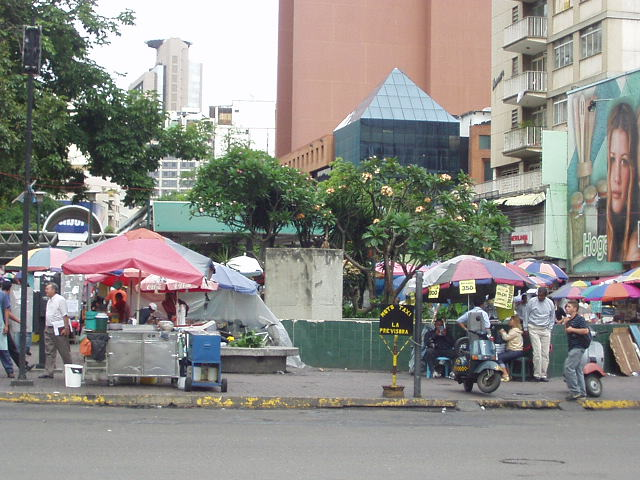 Plaza Venezeula Station. Caracas Metro. Caracas, Venezuela.